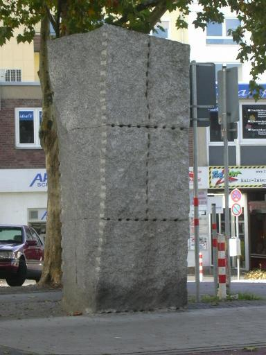 Stele in der Schuetzenstrasse in Dueren by Ulrich Rückriem in Düren/Germany own work papa1234 2006-11-01